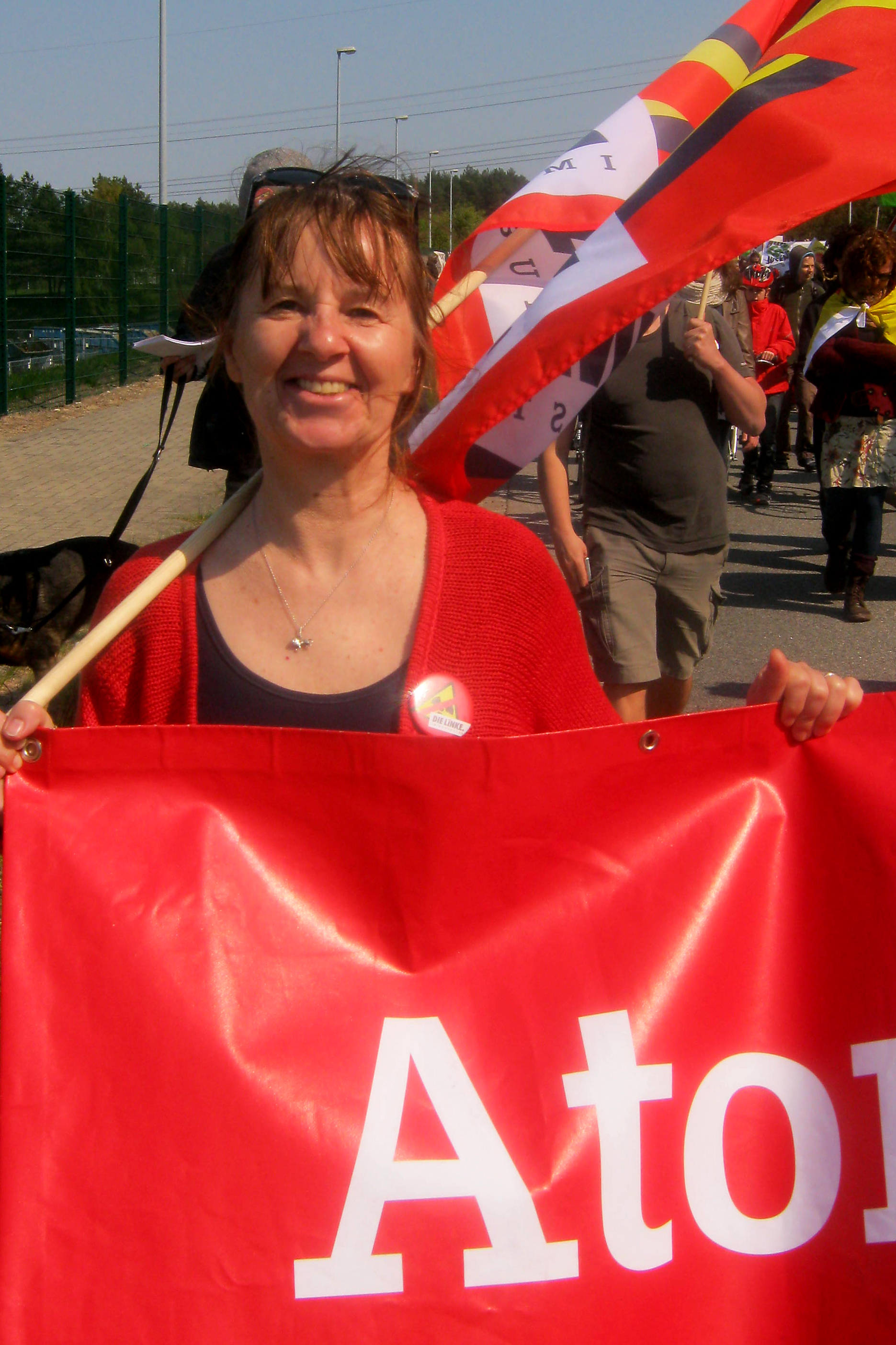 Sabine Stüber. Tschernobyl-Gedenktag und Protestkundgebung in Lubmin. Rund 2000 Menschen demonstrierten am 25.4.2011, dem 25. Jahrestag der Reaktor-Katastrophe von Tschernobyl, in Lubmin für den Ausstieg aus der Atomenergie. Mit dabei waren VertreterInnen der Fraktion DIE LINKE. im Bundestag.